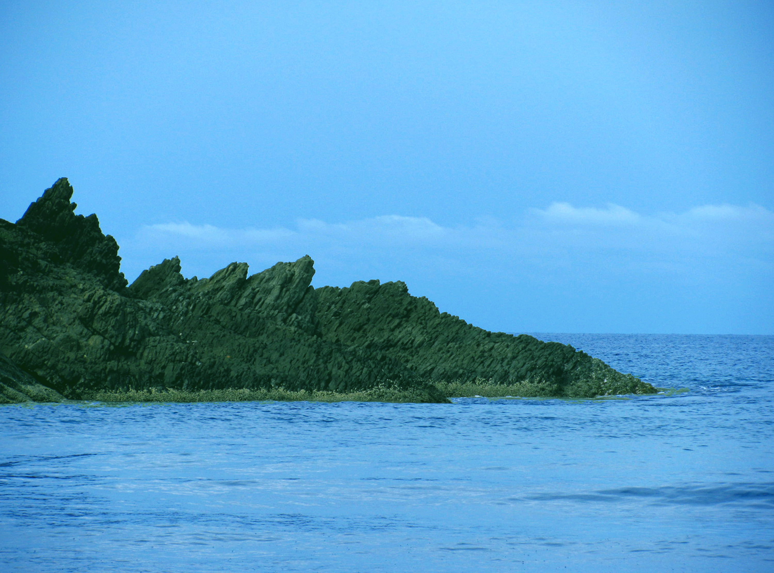 Batu Kutu - begitulah penduduk lokal menyebut tanjung kecil ini - dikarenakan bentuknya menyerupai sederetan orang yang sedang mencari kutu pada rambut orang di duduk depannya, berlokasi di Pesisir Selatan Sumatra Barat, desa Surantih.